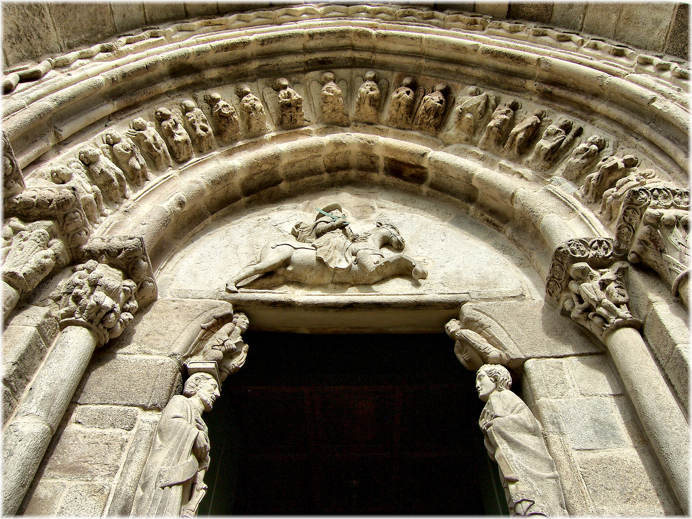 A igrexa de Santiago é o templo coruñés principal e o máis antigo. Comezouse a construír no século XII, durante o reinado de Fernando II. No seu adro reuníase o concello desde o século XV. A planta orixinal contaba con tres naves, que foron reducidas a unha só, de estilo oxival, no século XV. A fachada principal é románica e sobresae do muro nun bloque. Na arquivolta central aparecen os vinte anciáns do Apocalipse cos seus instrumentos musicais escoitando ao Salvador. O tímpano está sostido por anxos e nel aparece Santiago a cabalo. Esta figura, e algunha outra, proceden doutra parte. Polo leste hai tres ábsidas románicas, divididas no exterior por columnas con capiteis vexetais; a da esquerda está seccionada por un esquinal da torre. A igrexa conta con tres portas, das que a do norte é a máis antiga. O tímpano está sostido por dúas mochetas con cabezas de bovinos e representa un año entre dous circos que sostén unha cruz coas patas. A porta sur tamén é románica e ábrese á sancristía. A torre é igualmente románica, aínda que houbo de ser reparada no 1607 a causa dalgunha explosión, xa que foi o polvorín da antiga cidade. Forma un curioso recuncho coa casa do Consulado na que é a rúa máis curta da Coruña, a da Reixa Dourada. Resaltan os canzorros que sosteñen o beiril do tellado e o rosetón no testeiro da nave. Traido da Galipedia. Samsung digital camera